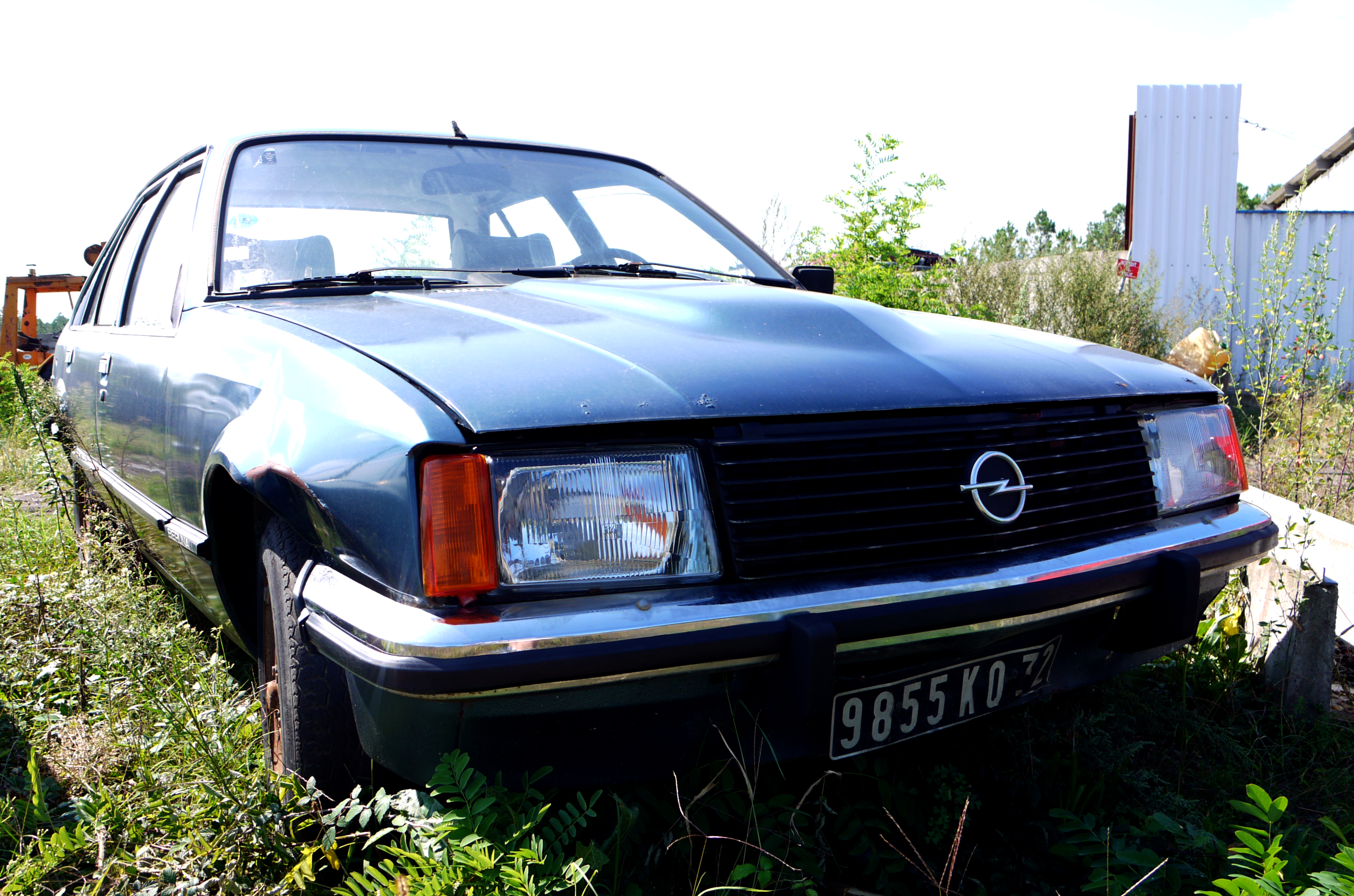 Opel Rekord 2.1D saloon.